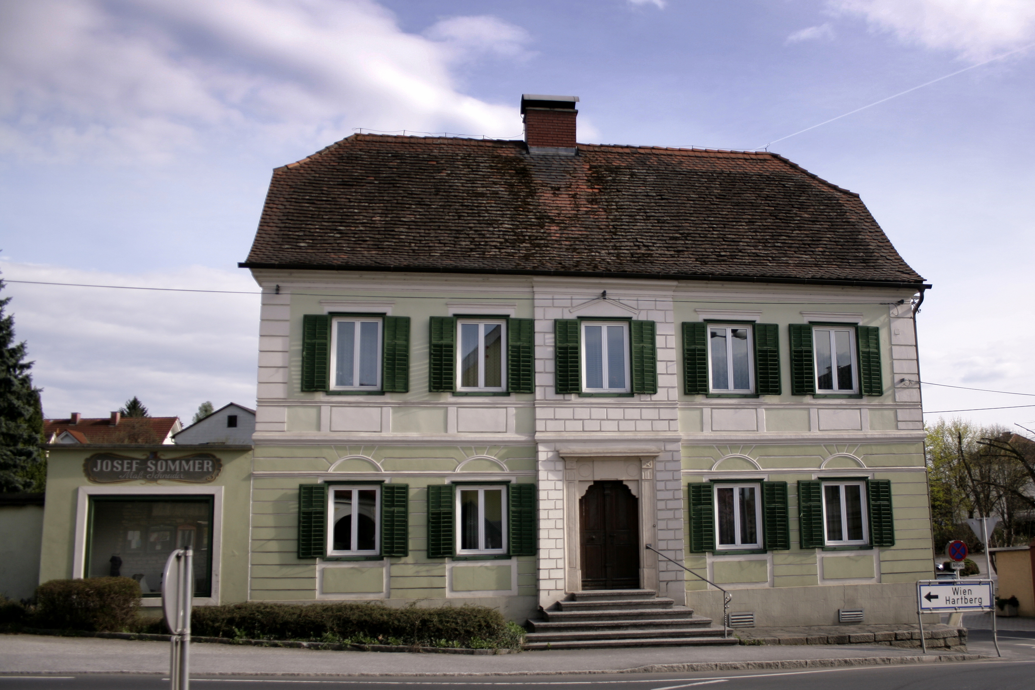 Kaindorf Bürgerhaus